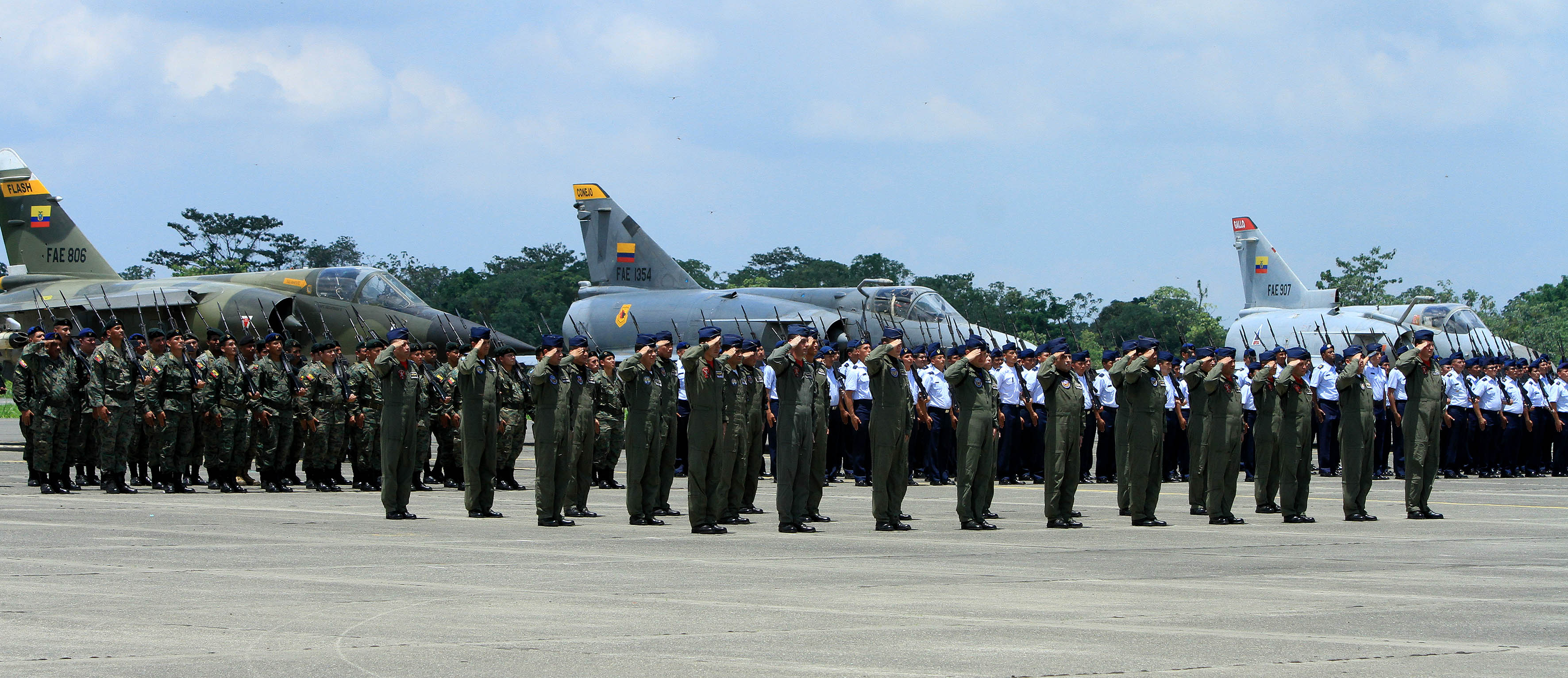 Guayaquil, martes 10 de febrero del 2015 (ANDES).-En la base aérea Taura se realizó una ceremonia en conmemoración del vigésimo aniversario del triunfo aéreo en el conflicto bélico del Cenepa